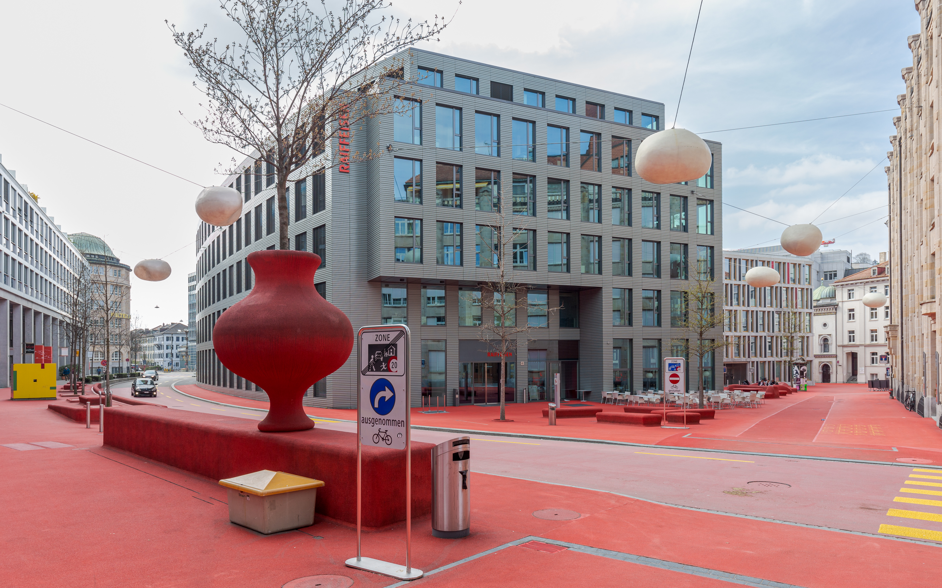 Gebäude von Raiffeisen Schweiz an Gartenstrasse/Schreinerstrasse/Raiffeisenplatz mit Elementen der City Lounge St. Gallen